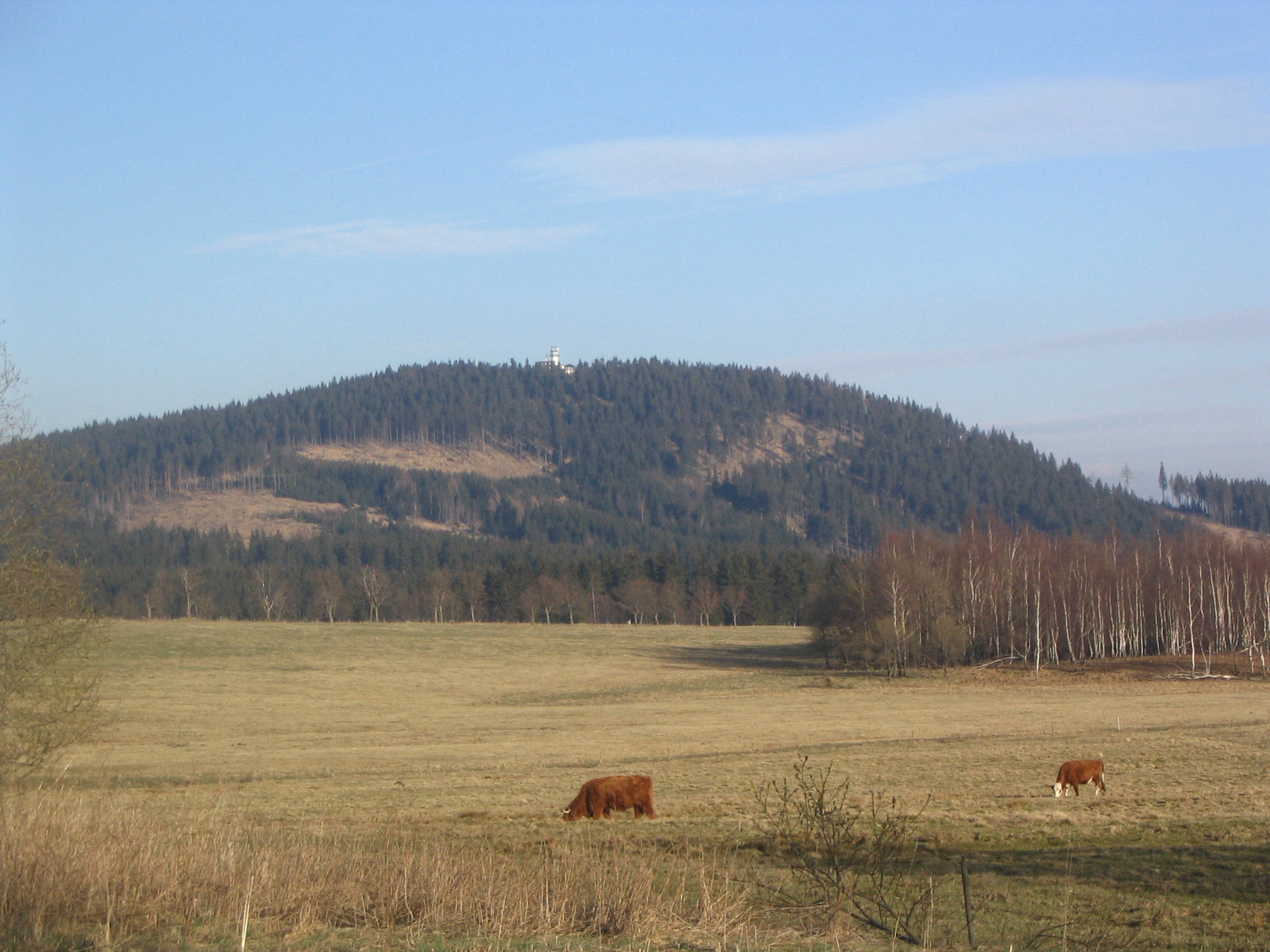 Plešivec v Krušných horách; pohled od Abertam